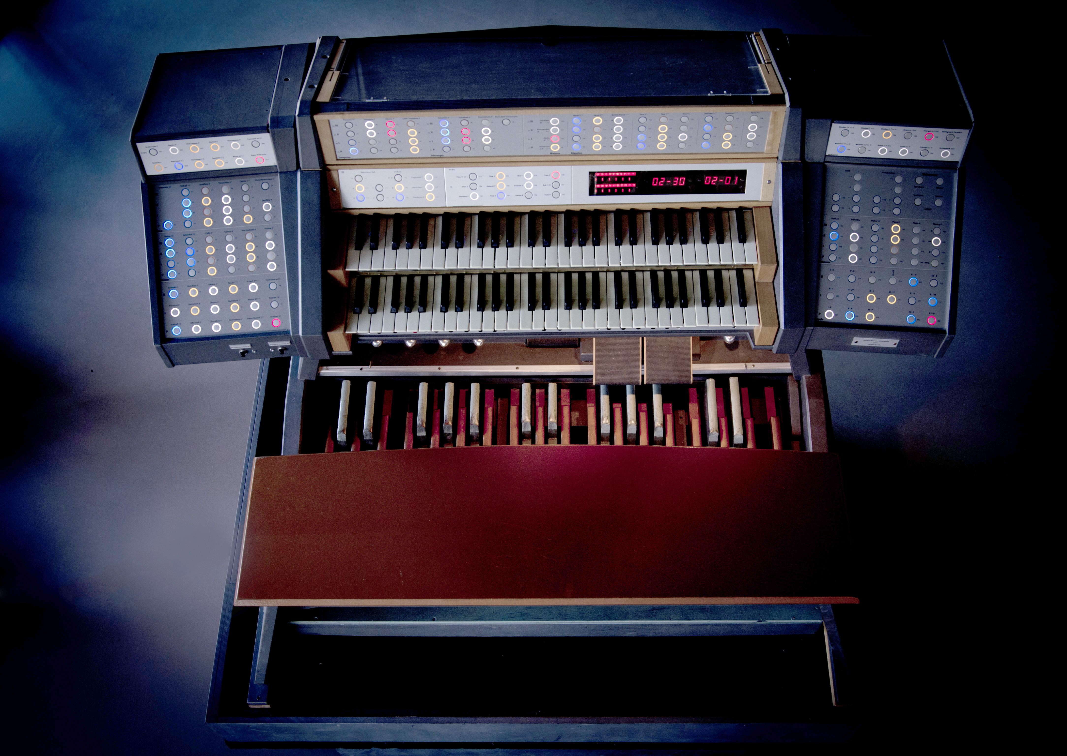 Harder-Völkmann-Orgel im Stockwerk Gröbenzell Orgeltisch